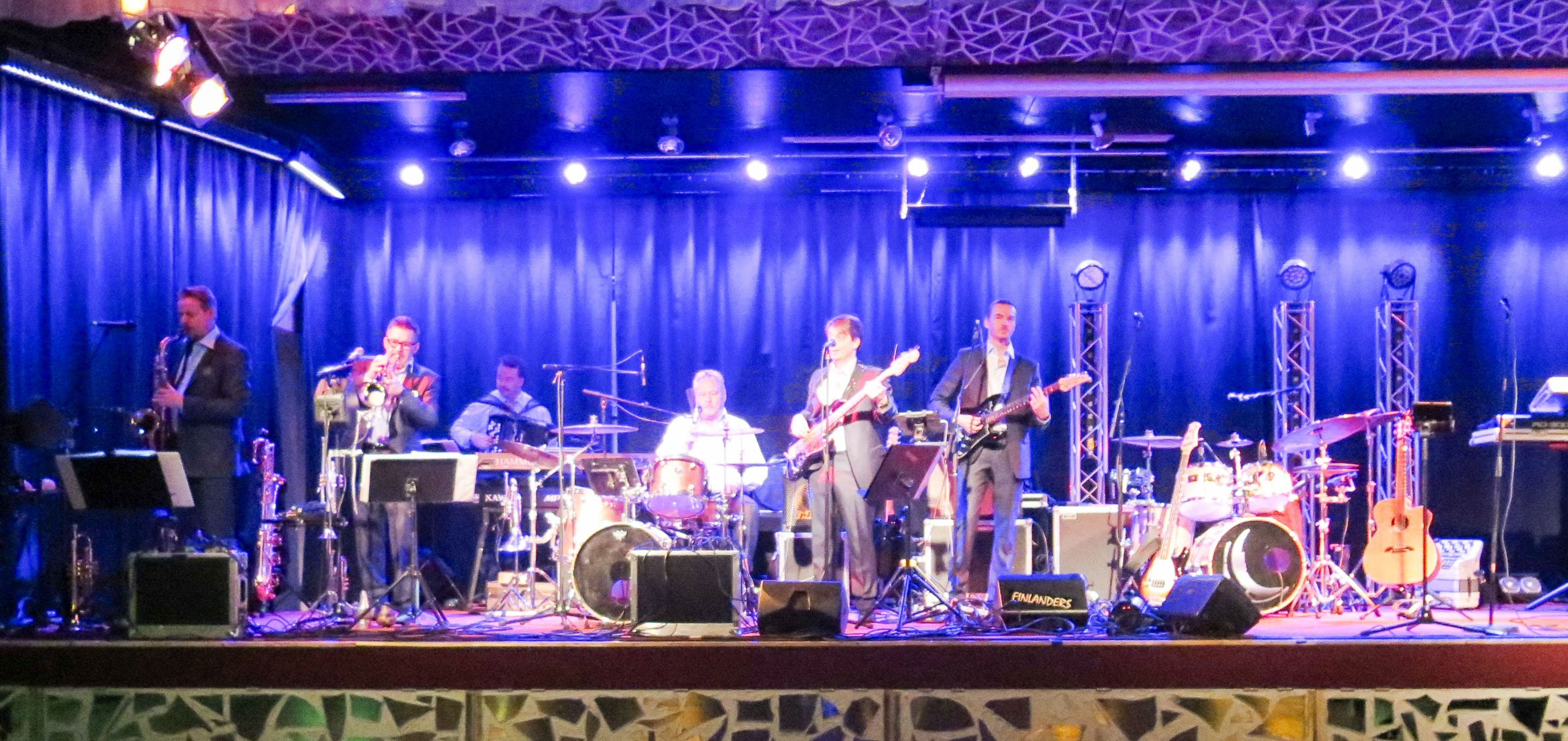 Finlanders yhtye vuonna 2014